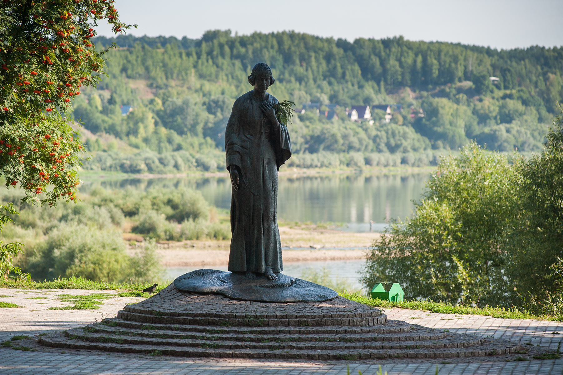 Памятник Марине Цветаевой в городском сквере